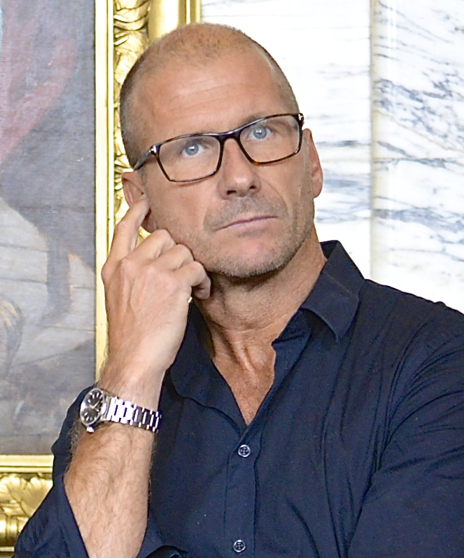 Stefan Larsson under Dramatens höstsamling den 19 augusti 2014.